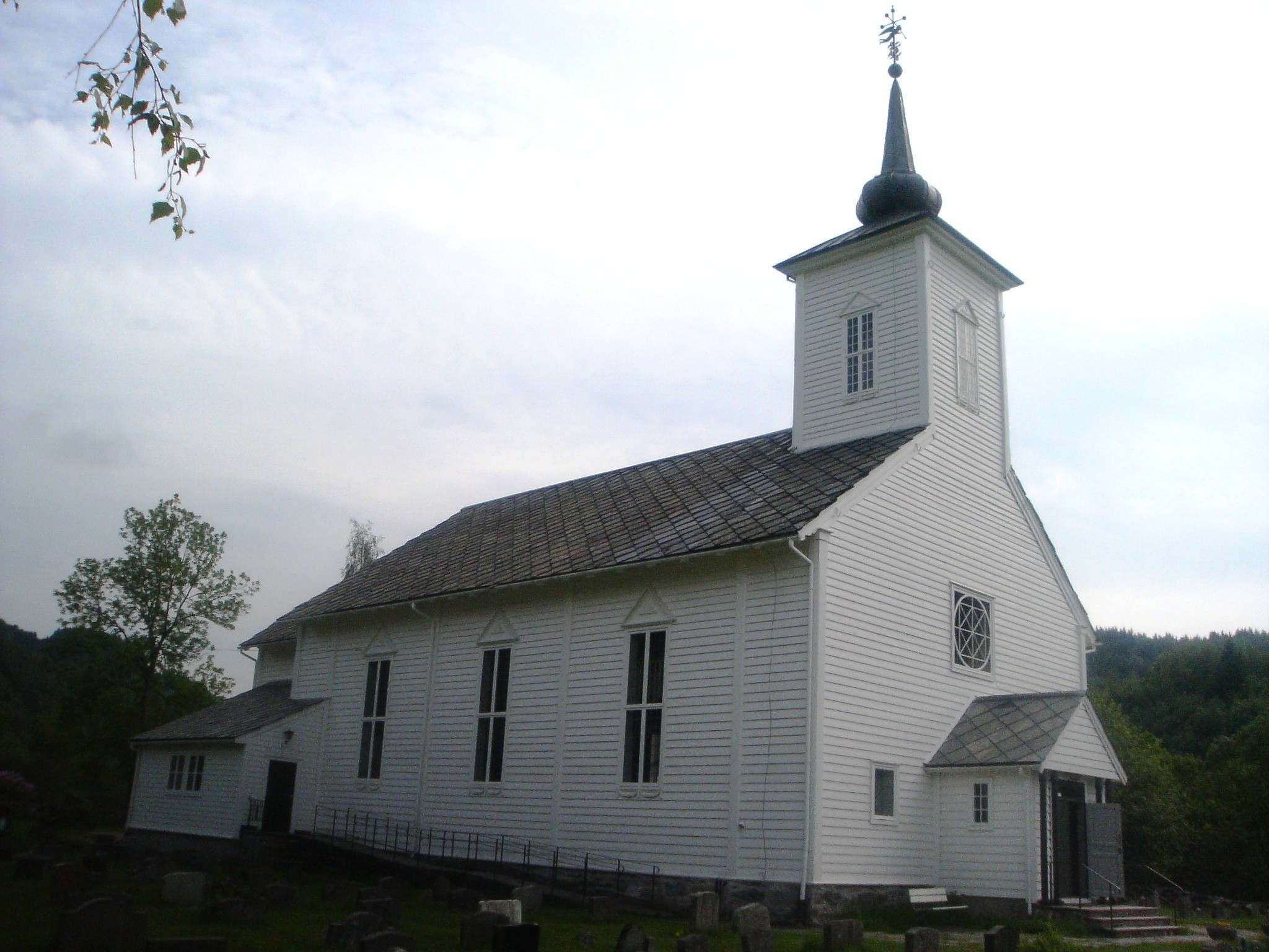 Gjerstad kirke